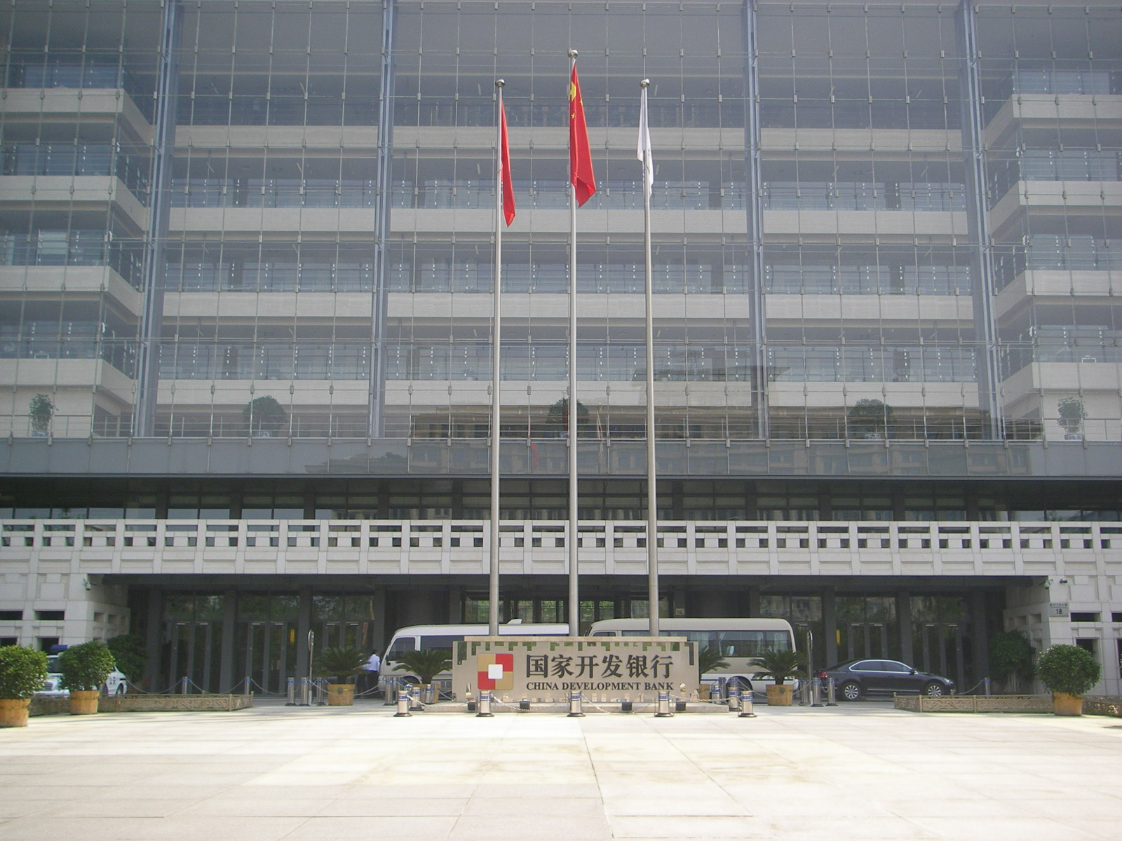 国家開発銀行正面入口（北京）201705